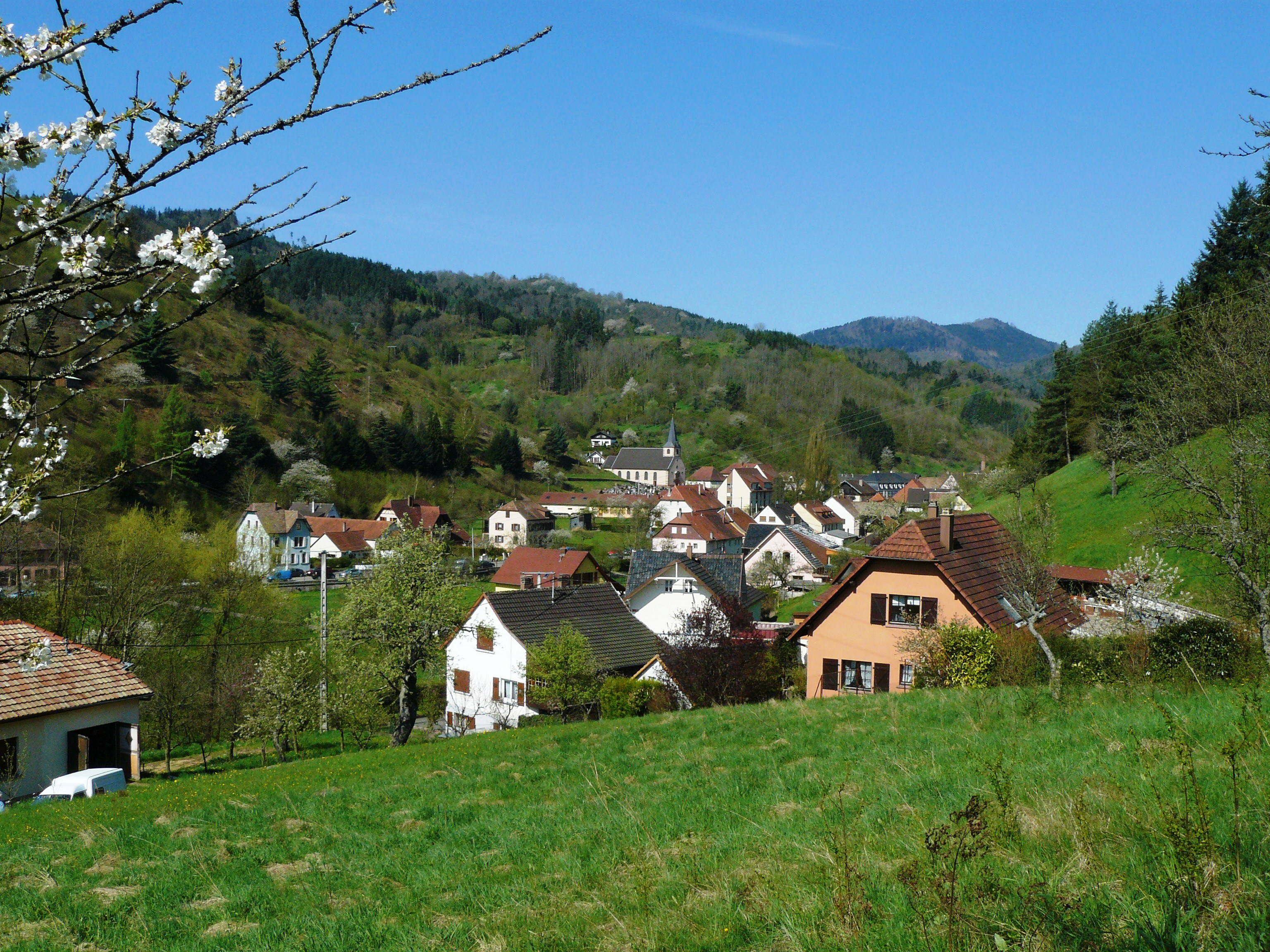 ROmbcah-Le-Franc vu depuis la Vaurière